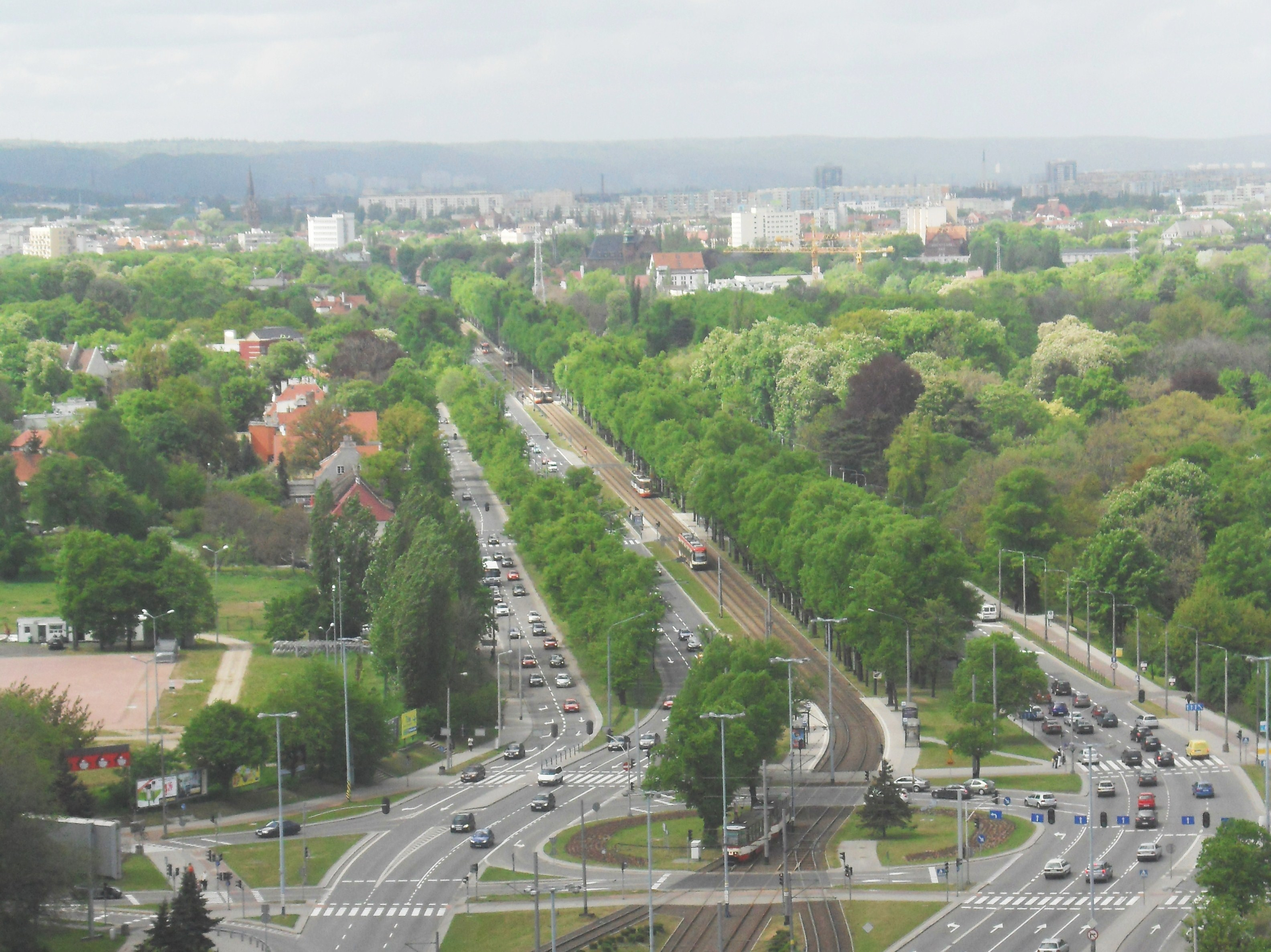 Gdańsk, al. Zwycięstwa. Widok z "Zieleniaka" (przez szybę) w kierunku Sopotu.